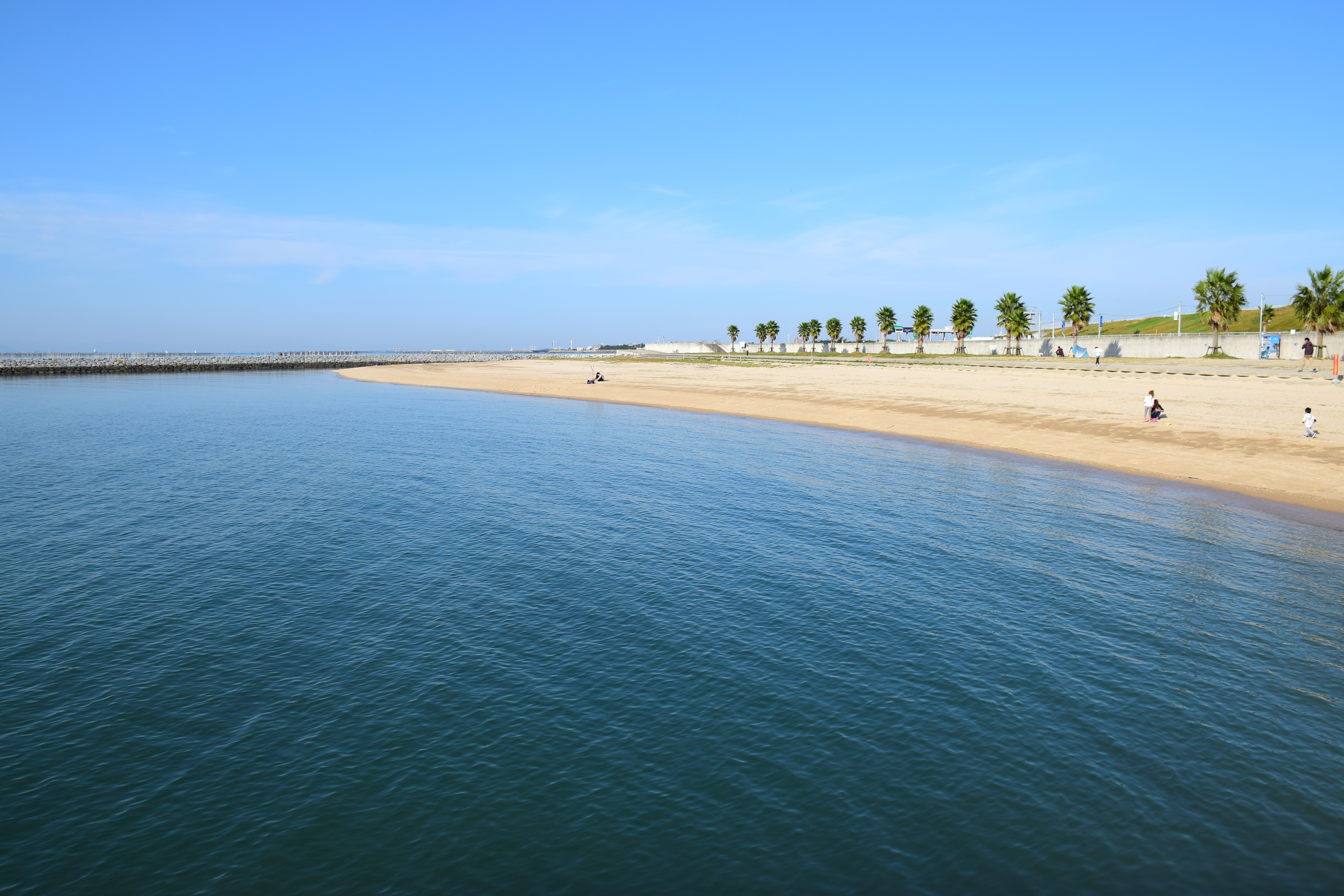 りんくうビーチは長さ約６３０ｍの人工海浜